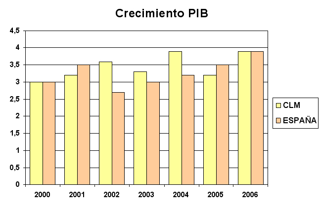 Comparativa crecimiento PIB C-LM con España